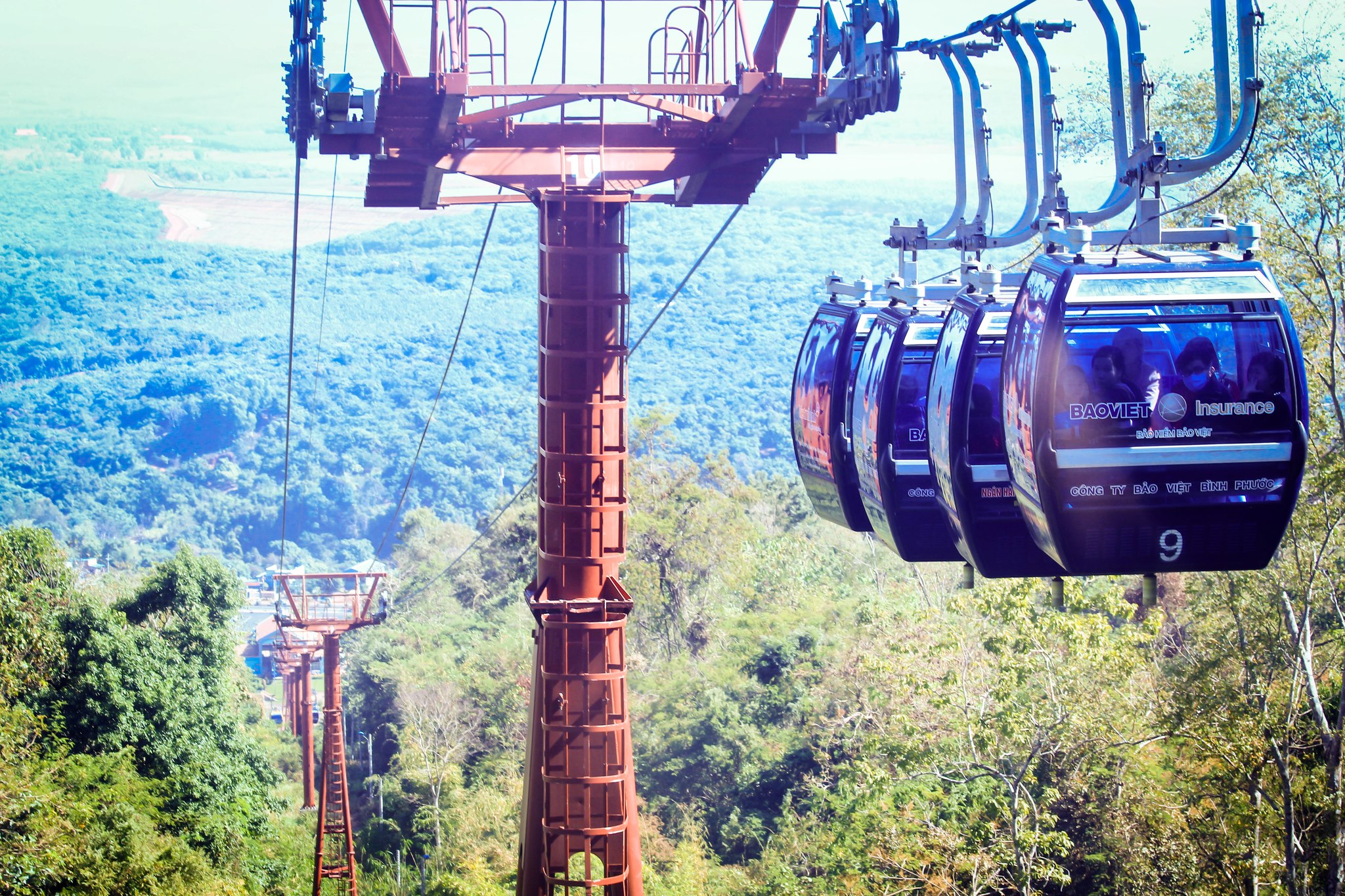 Cáp treo núi Bà Rá